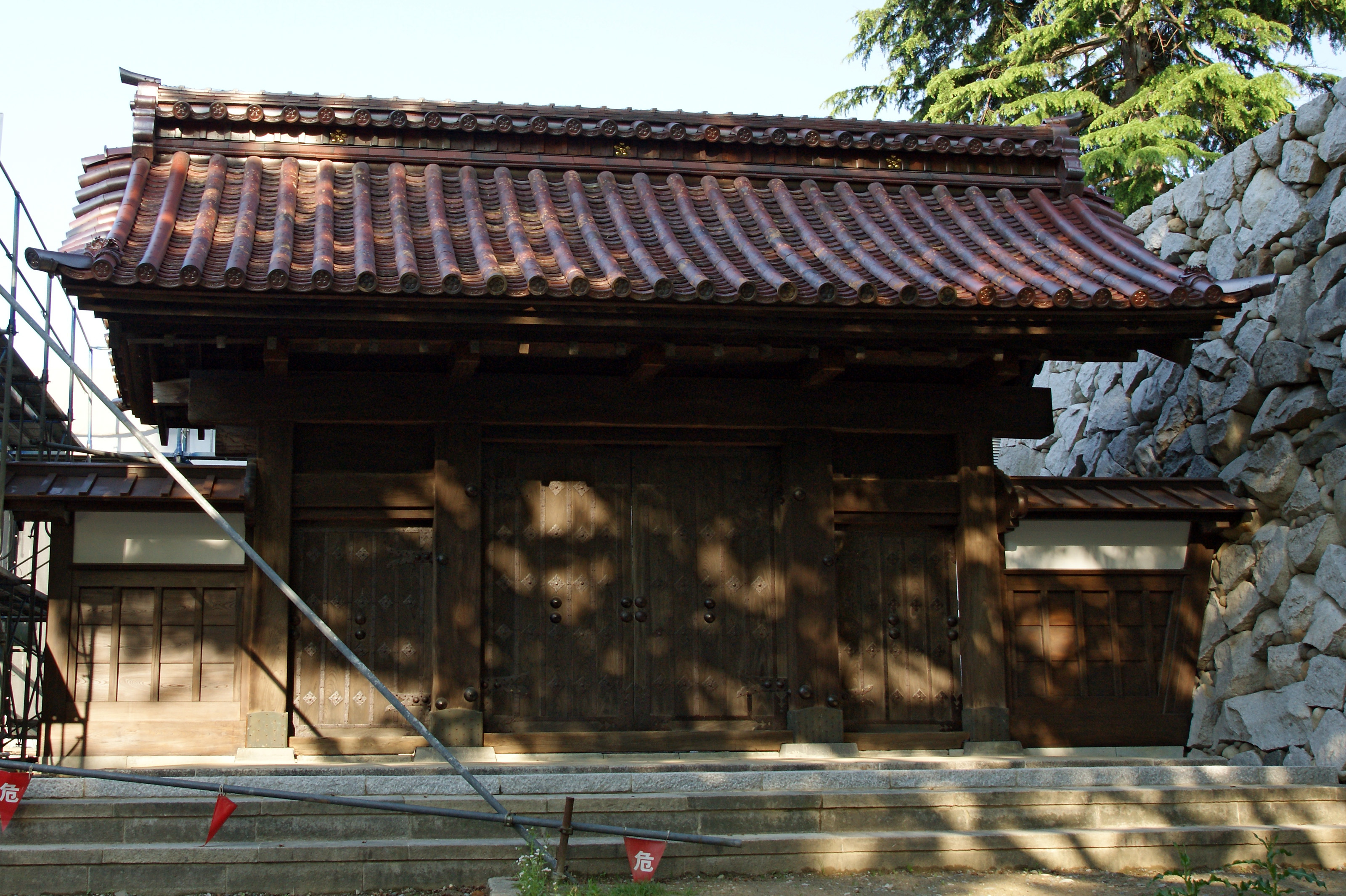 Toyama-joshi-koen in Toyama, Toyama prefecture, Japan